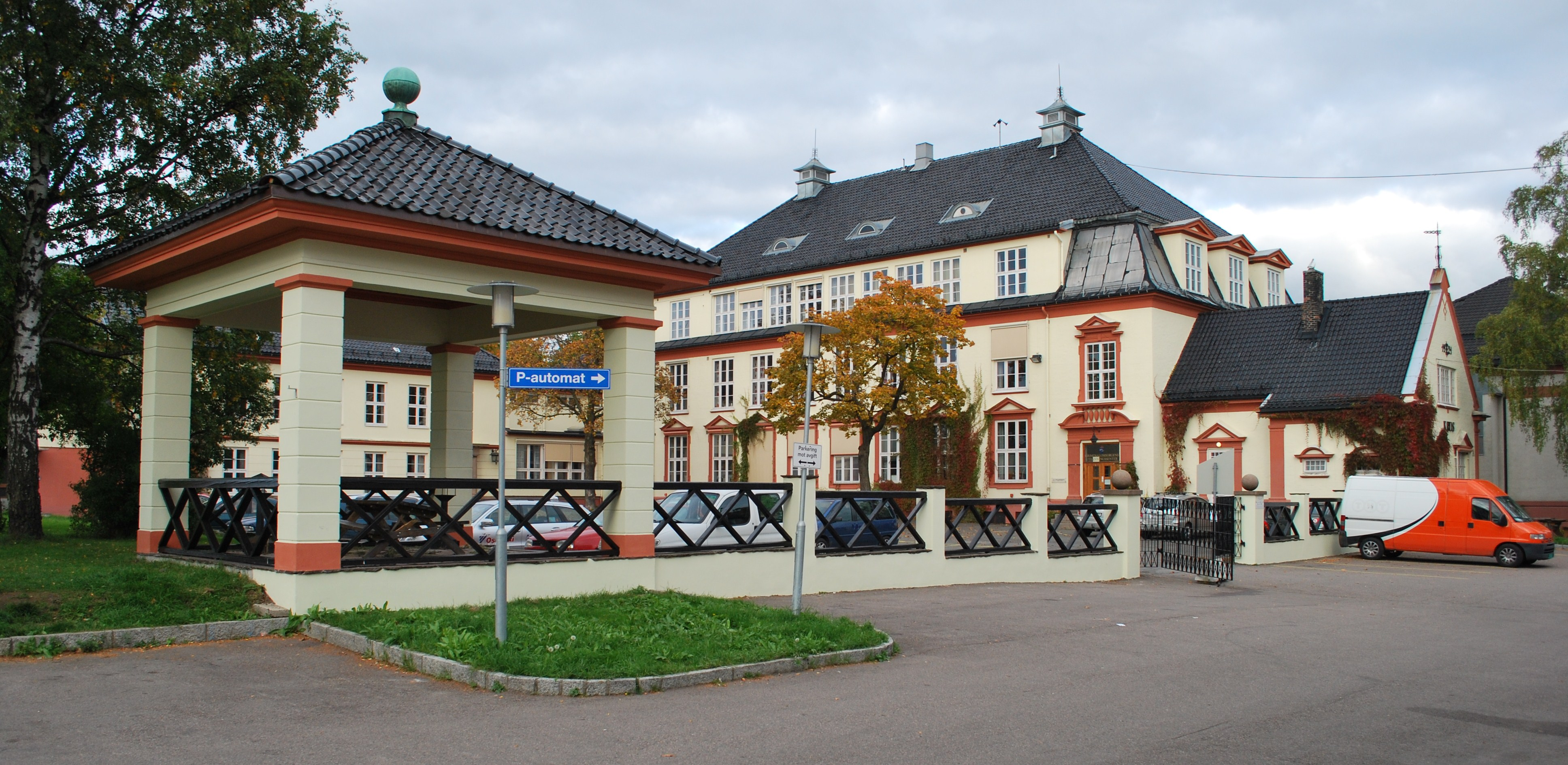 Kriminalomsorgens utdanningssenter, Teisen, Oslo, tidligere Teisen videregående skole